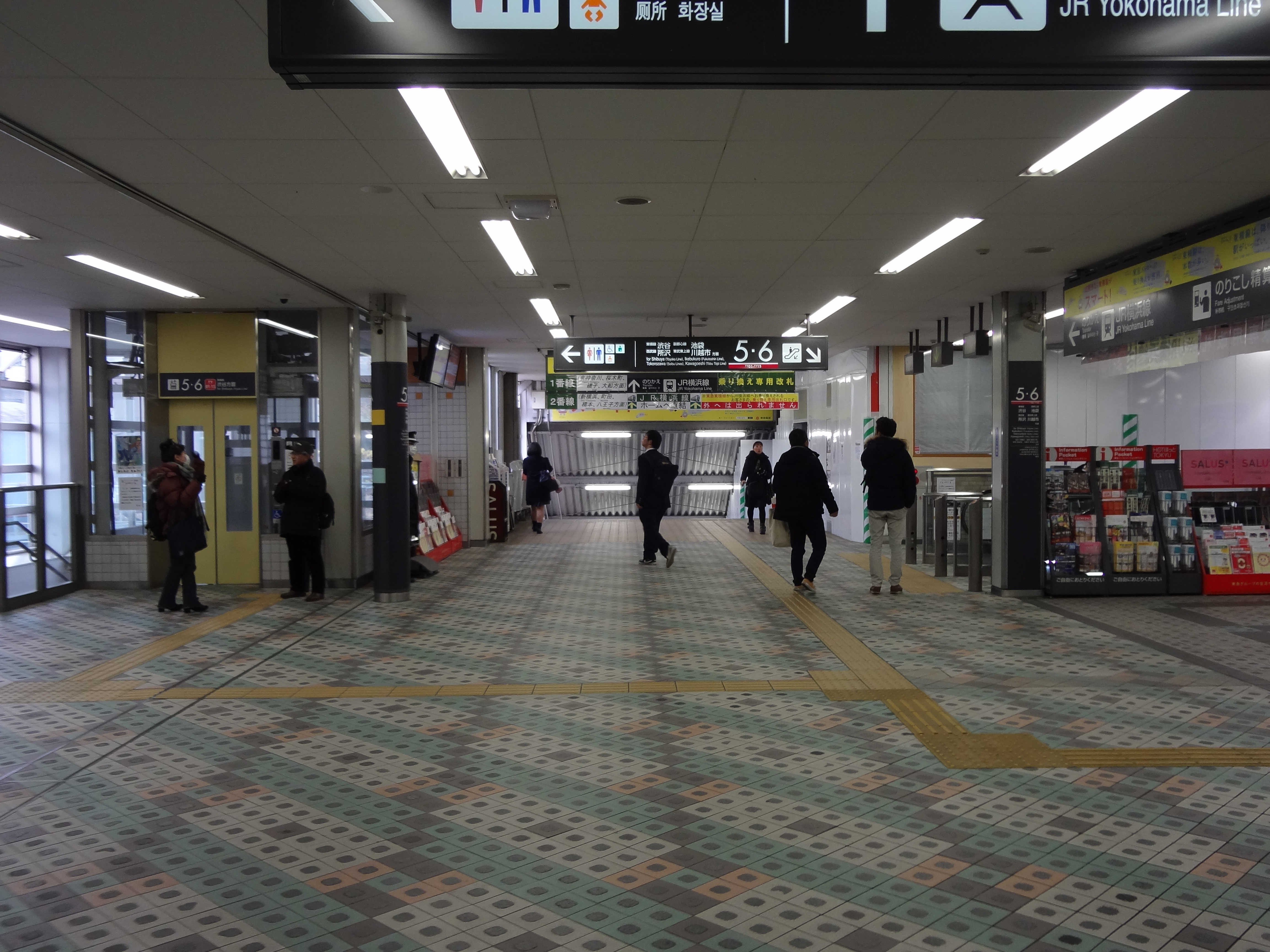 コンコース（2016年1月23日）